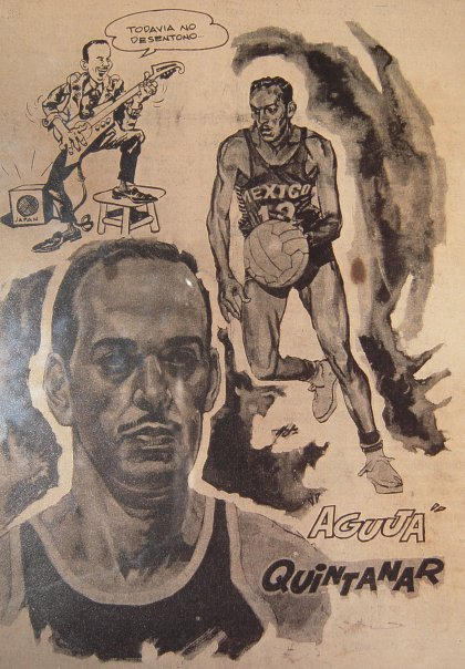 Japón '64, sin duda uno de los momentos más altos de su carrera.